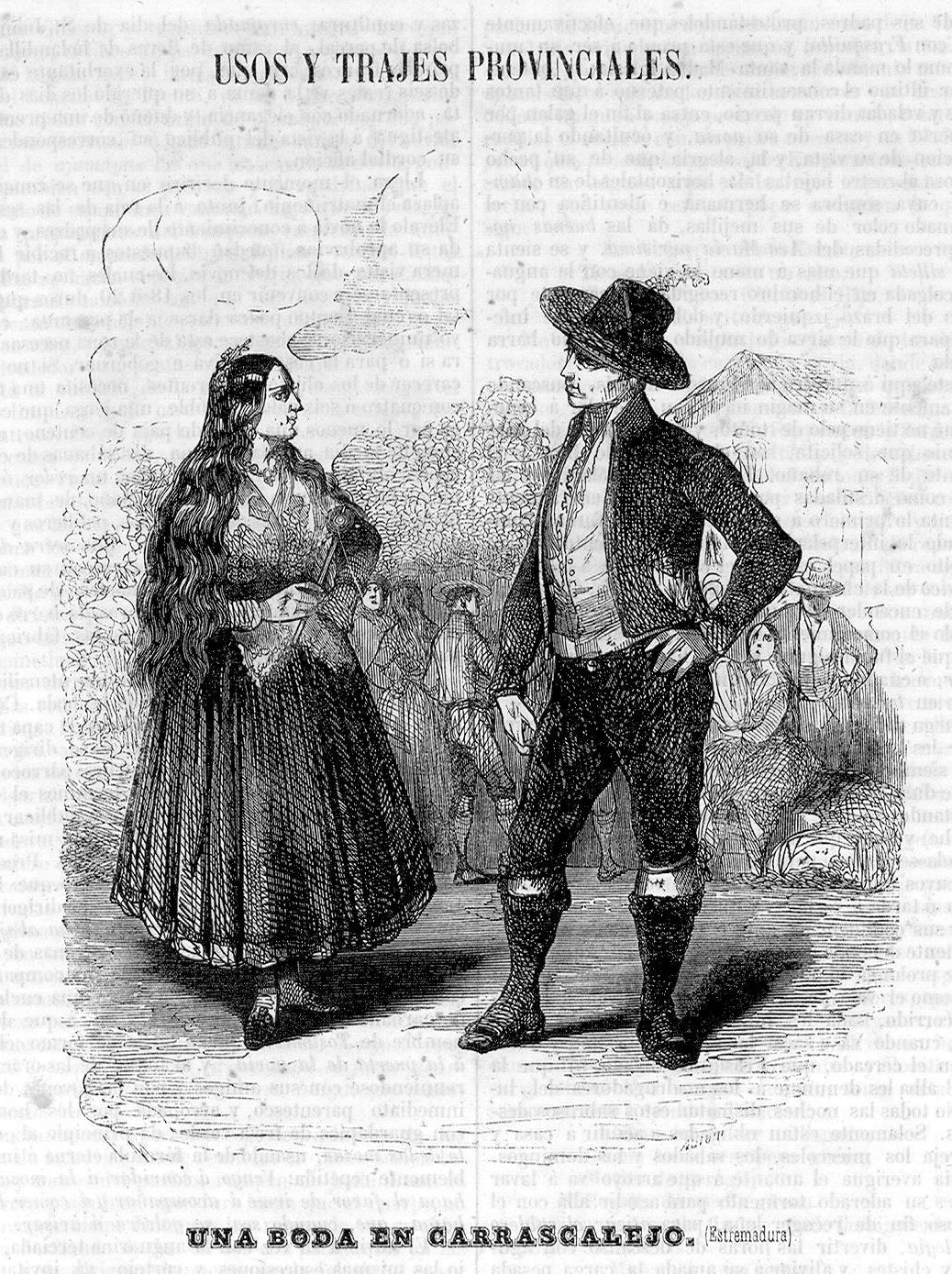 Usos y trajes provinciales. Una boda en Carrascalejo (Estremadura).